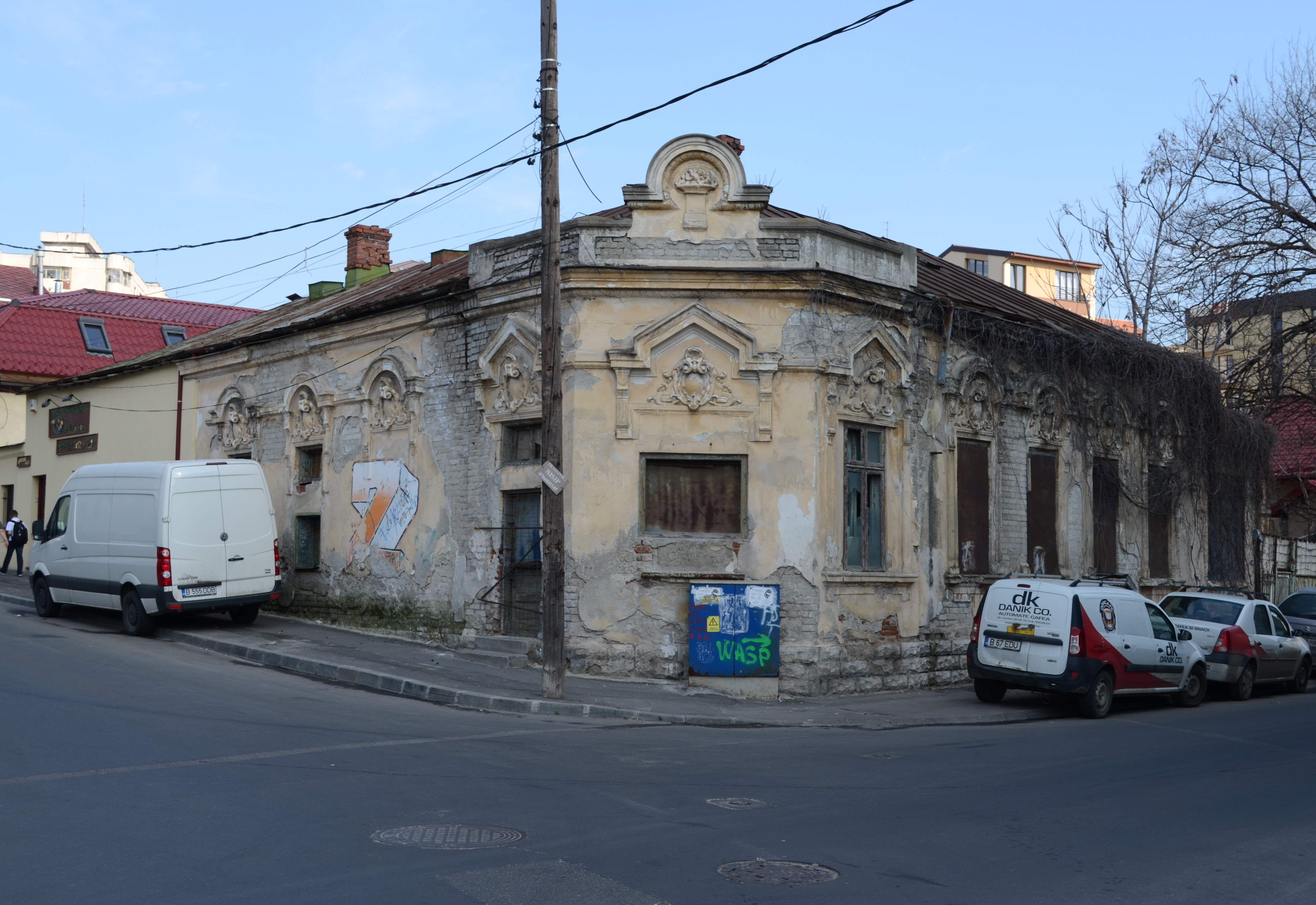 Casă, Str. Ion Minulescu nr. 55